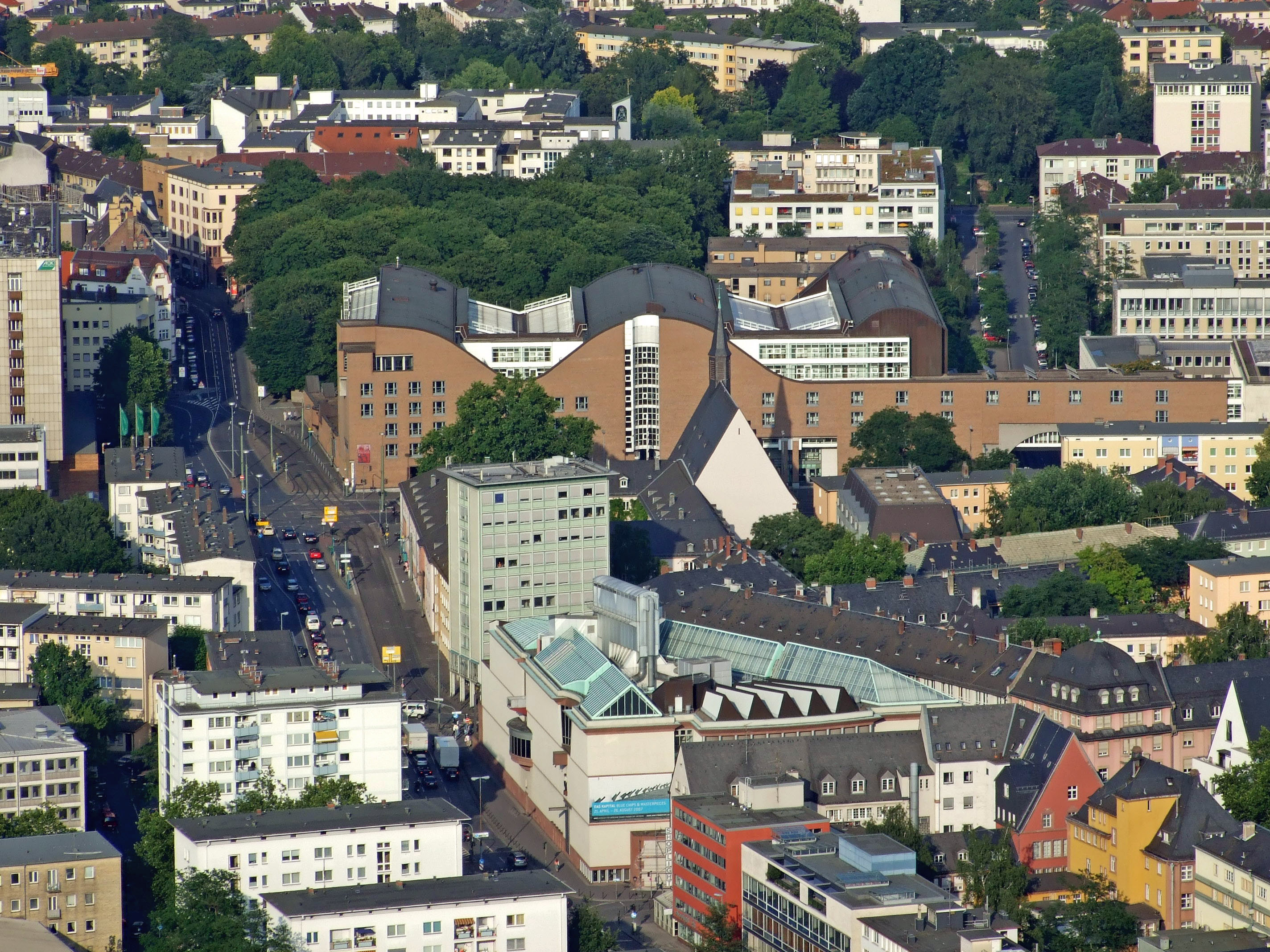 MMK vor Dominikanerkloster und mainova (mit einer Zweigstelle des Jüdischen Museums) und dahinter dem (alten) Jüdischen Friedhof an der Battonstrasse